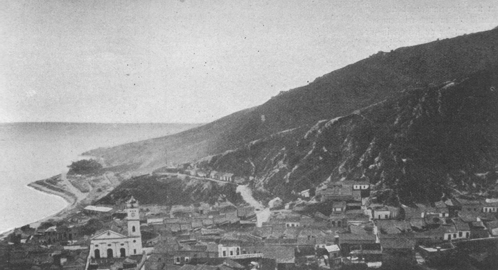 La Guaira im Jahr 1902.